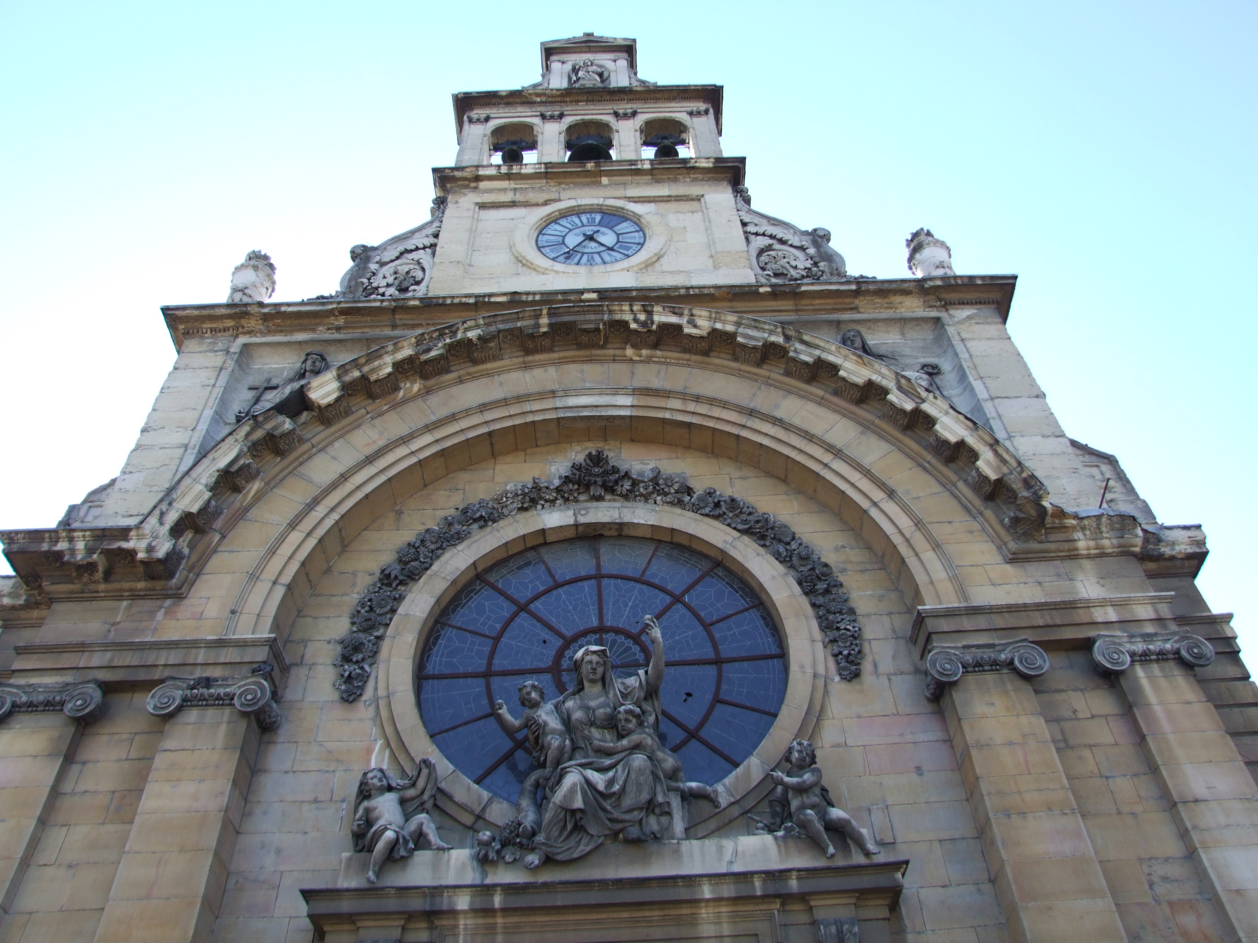 Chapelle de l'hôpital général, Dijon, Côte-d'Or, Bourgogne, FRANCE